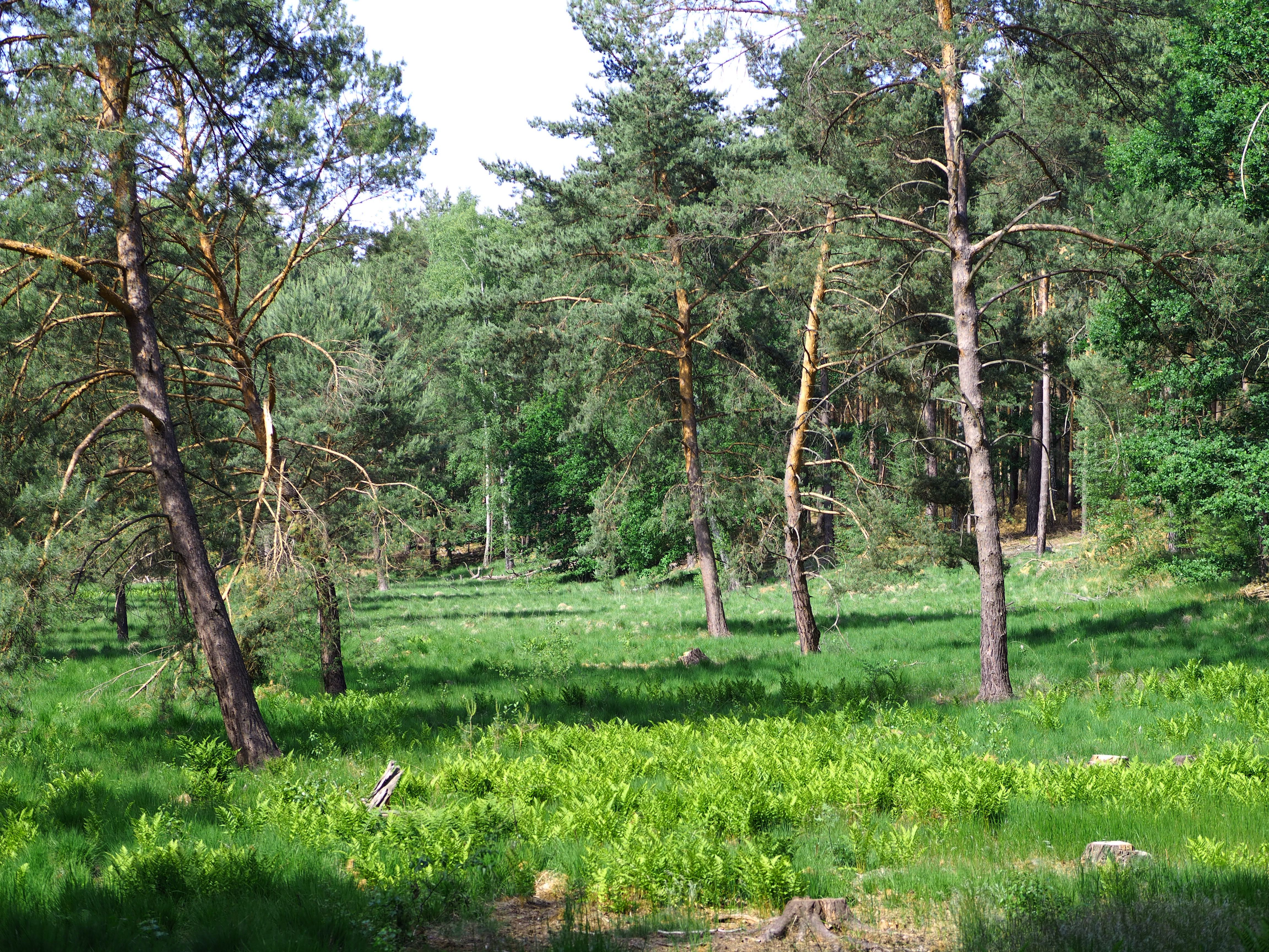 Großes Fenn in Berlin-Steglitz-Zehlendorf, Jagen 60 des Düppeler Forstes